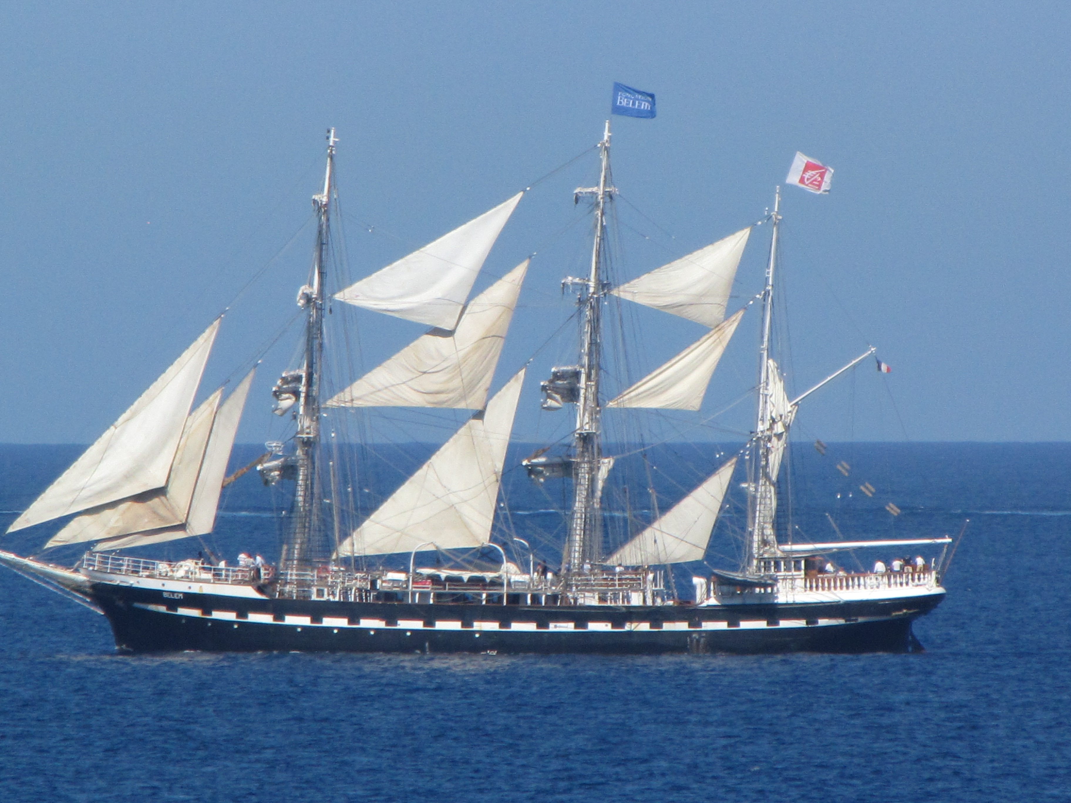 Devant le sémaphore d'Ile Rousse (Haute Corse)